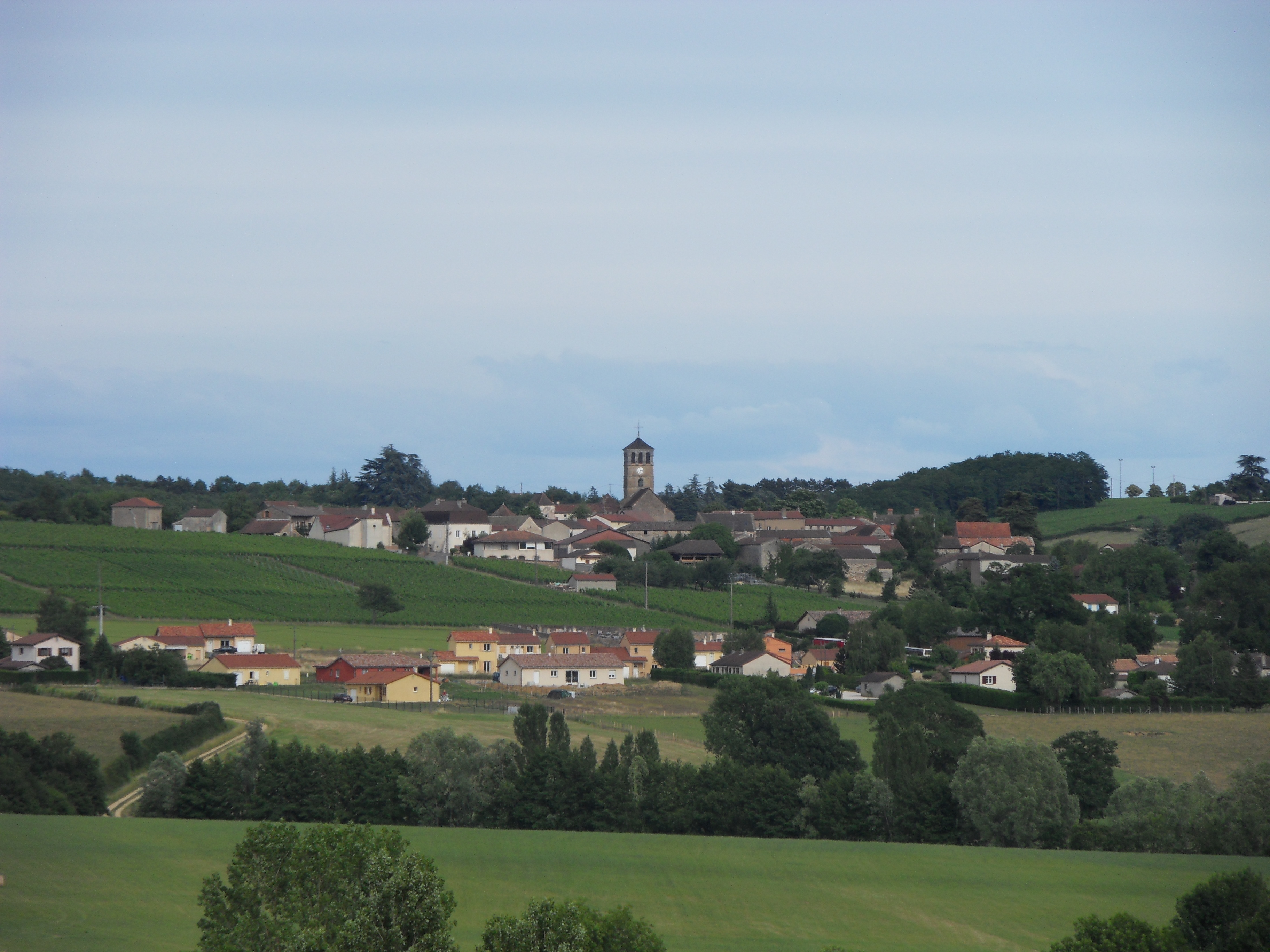 Commune de Péronne (Saône-et-Loire)